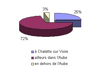 Répartition des lieux de travail des habitants de Chalette sur Voire actifs